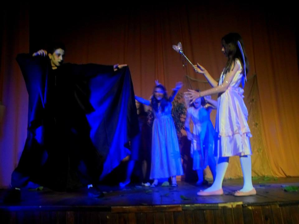 Српски (ћирилица): Драмски студио "Просвјета", Вишеград